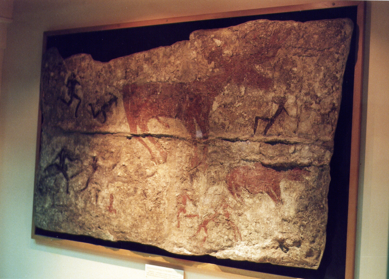 Museum für anatolische Zivilisationen, Ankara, Türkei, Wandmalereien aus Catalhöyük